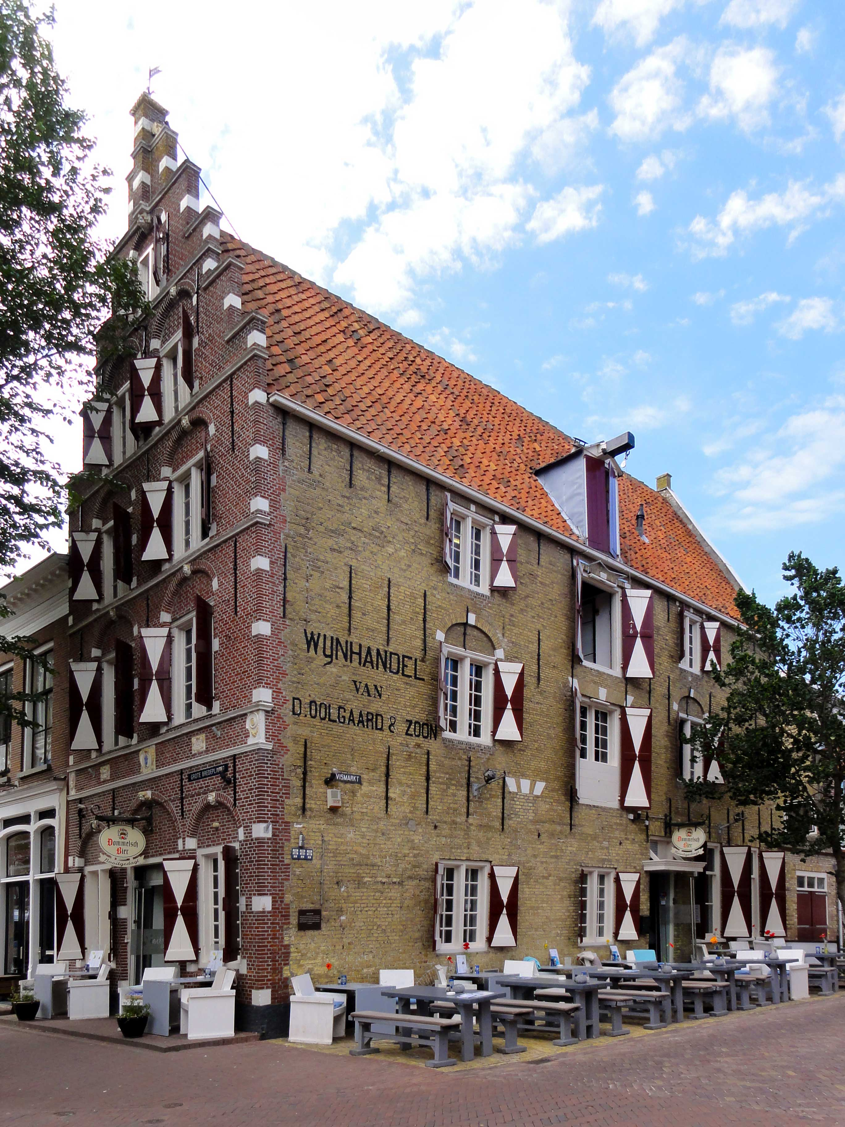 De Blauwe Hand aan de Grote Bredeplaats 35 in Harlingen